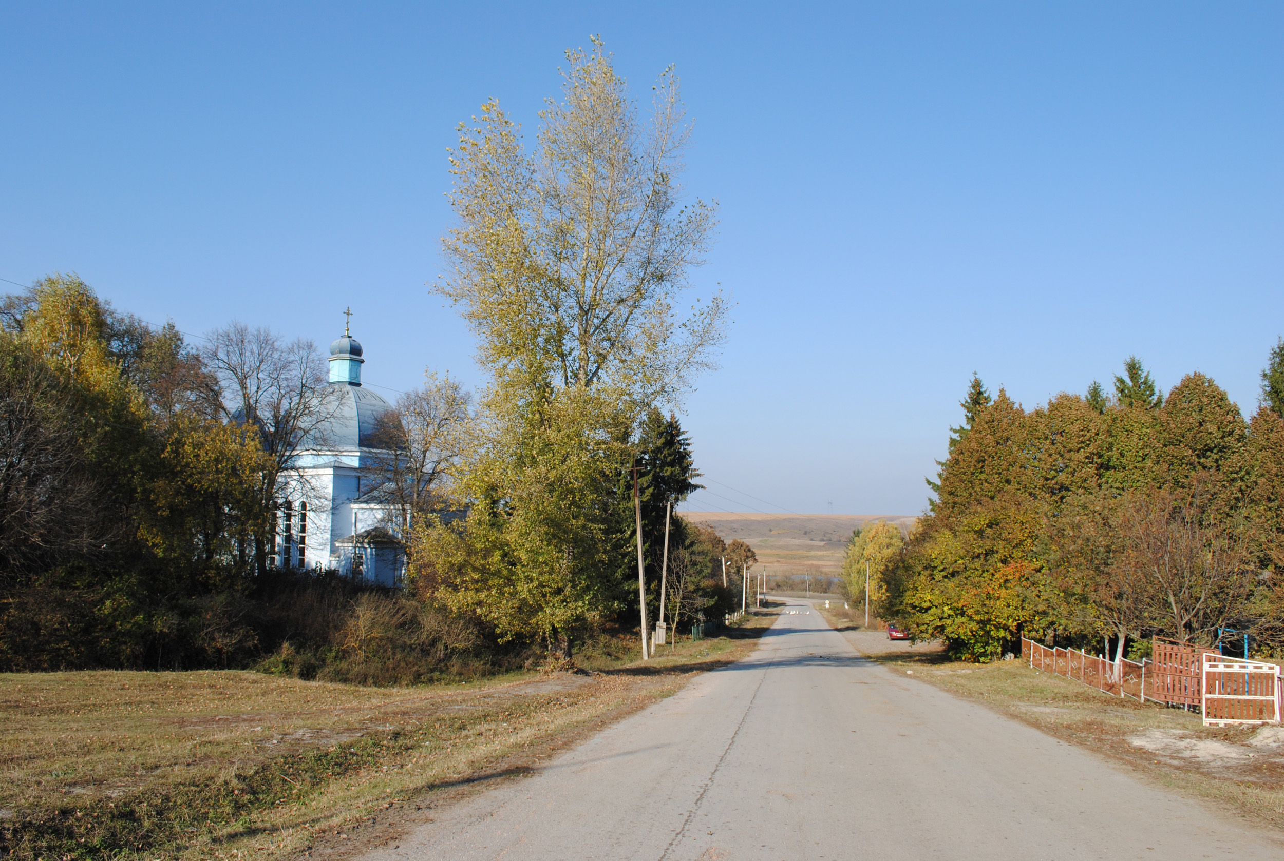 Вулиця Лановецька в с. Піщатинцях Шумського району Тернопільської області, є частиною автошляху С201702. Зліва — церква Пресвятої Богородиці (1938, мурована).